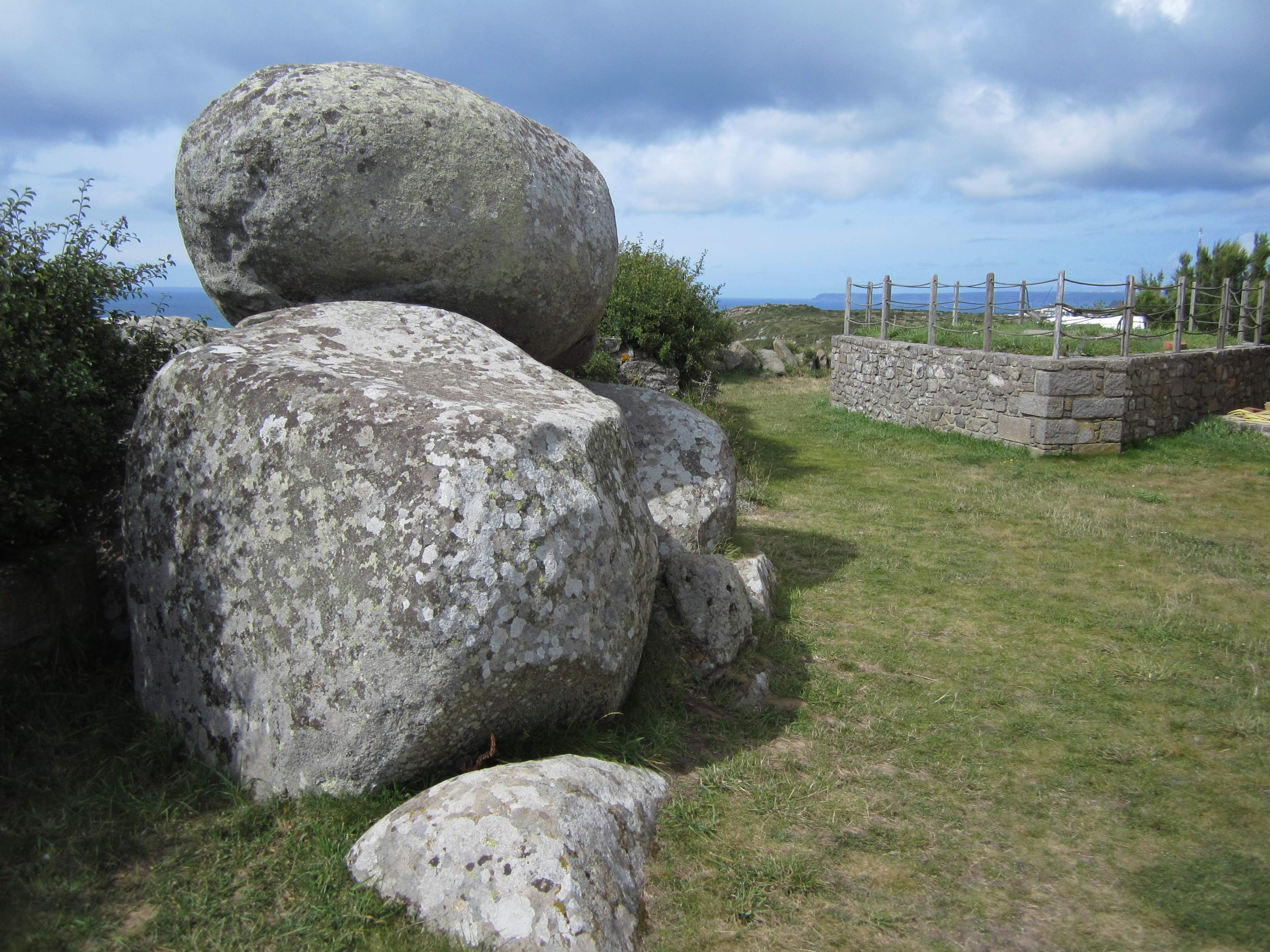 Pierre au Rey, flamanville (Manche) .